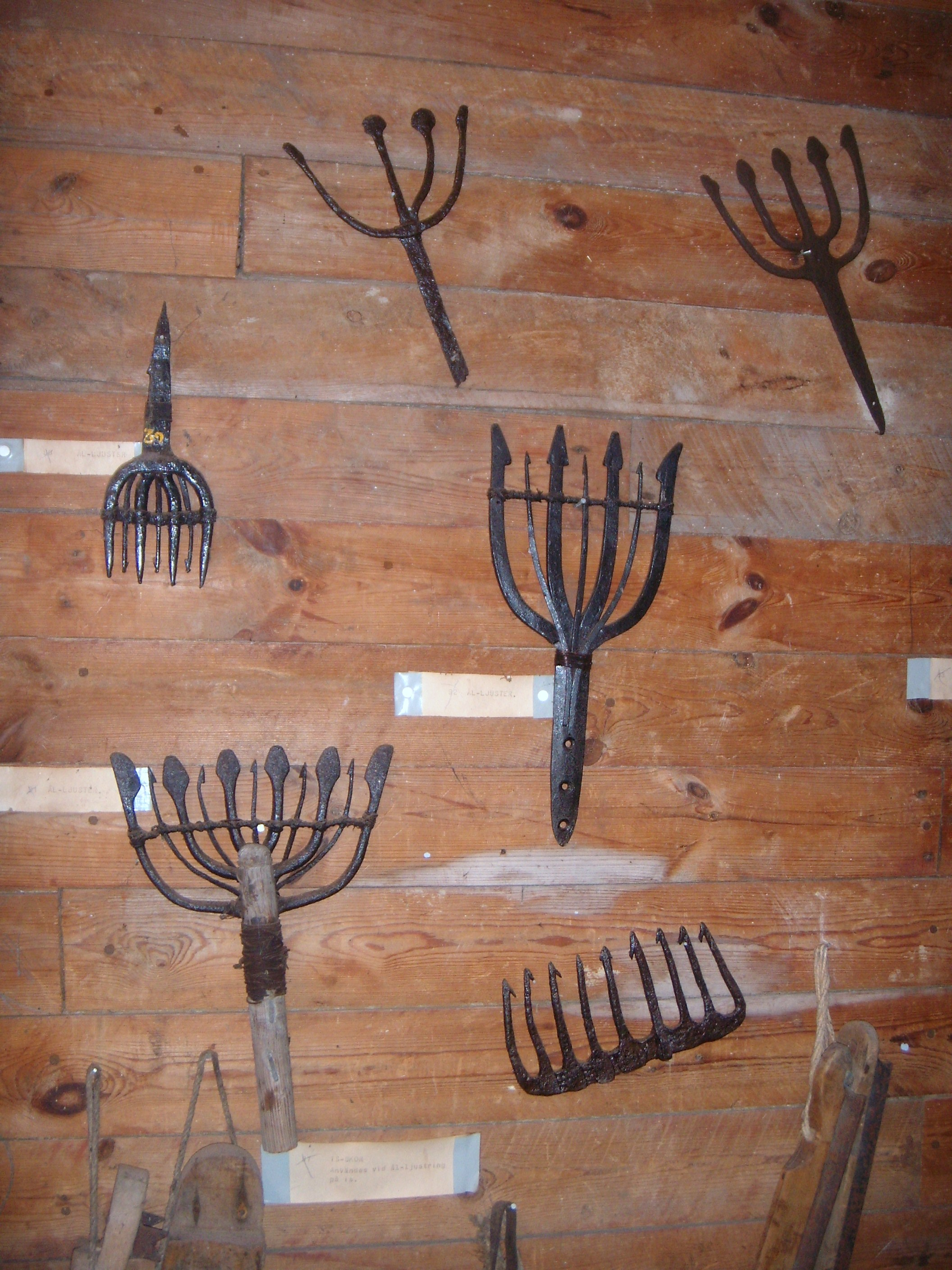 Ljuster